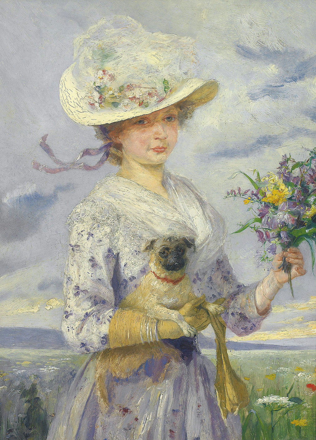 Selbstbildnis der Künstlerin